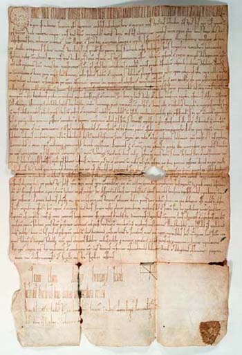 Urkunde über eine Schenkung, in der auch Rotfelden erwähnt wird